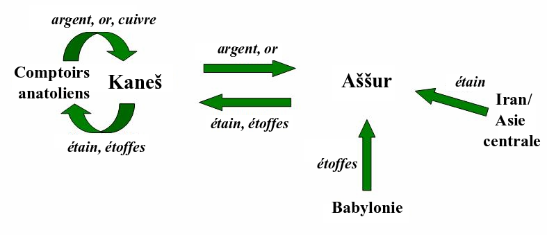 Modèle représentant le circuit commercial des marchands assyriens aux Template:XIXe-Template:XVIIIe siècles. Adapté d'après M. T. Larsen, Old Assyrian Caravan Procedures, Istanbul, 1967.